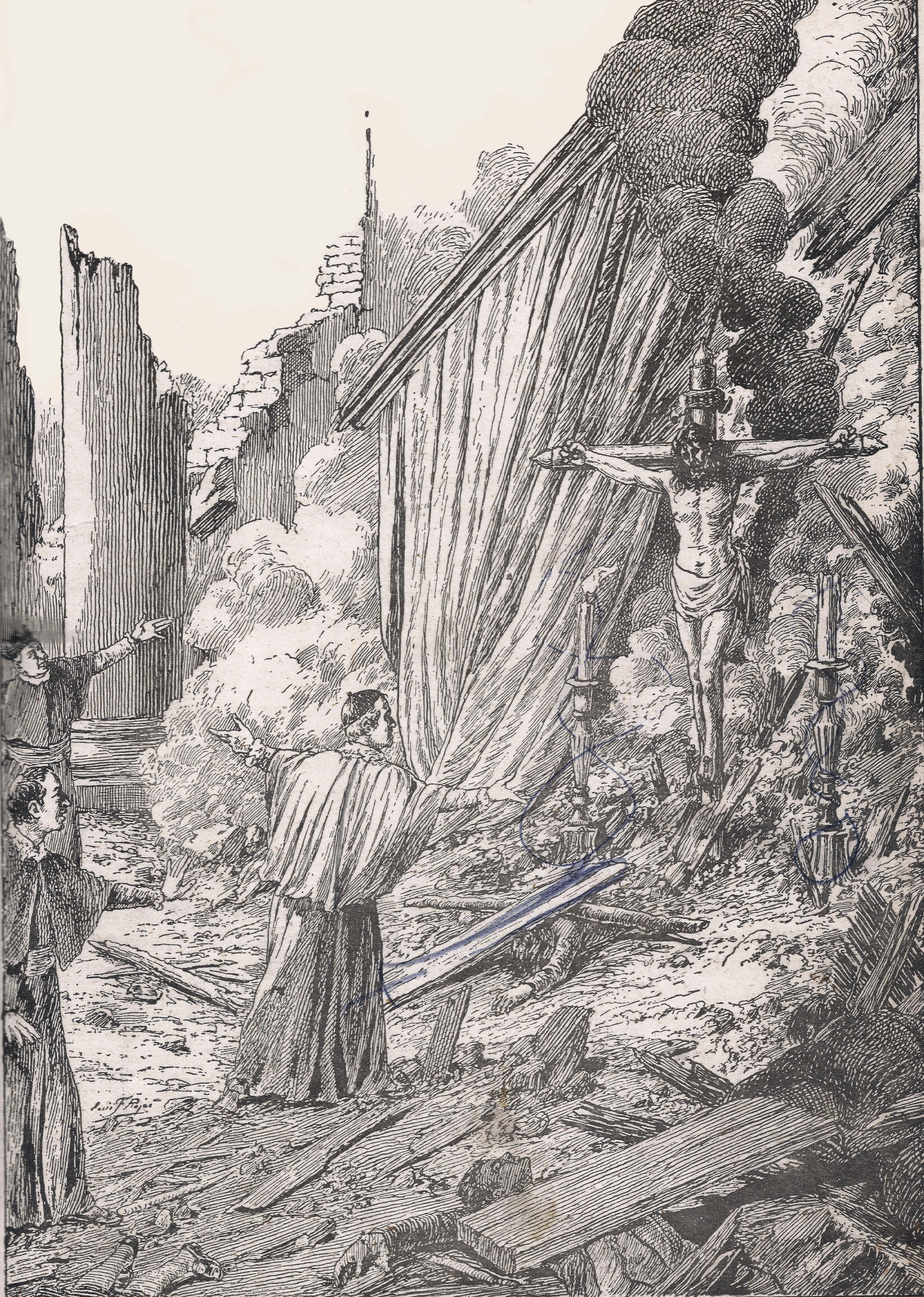 Ilustración de Luis Fernando Rojas para el libro "Episodios Nacionales", mostrando al Cristo de la Agonía sobreviviendo al terremoto del 13 de mayo 1647, en el artículo "El Señor de Mayo". EL SEÑOR DE MAYO.- Y entre las ruinas de San Agustín, sacudido también por el horrible terremoto que el 13 de mayo de 1647 destruyó a Santiago, se levantaba el Señor de la Agonía entre los velones que había encendido en manda de la "Quintrala".